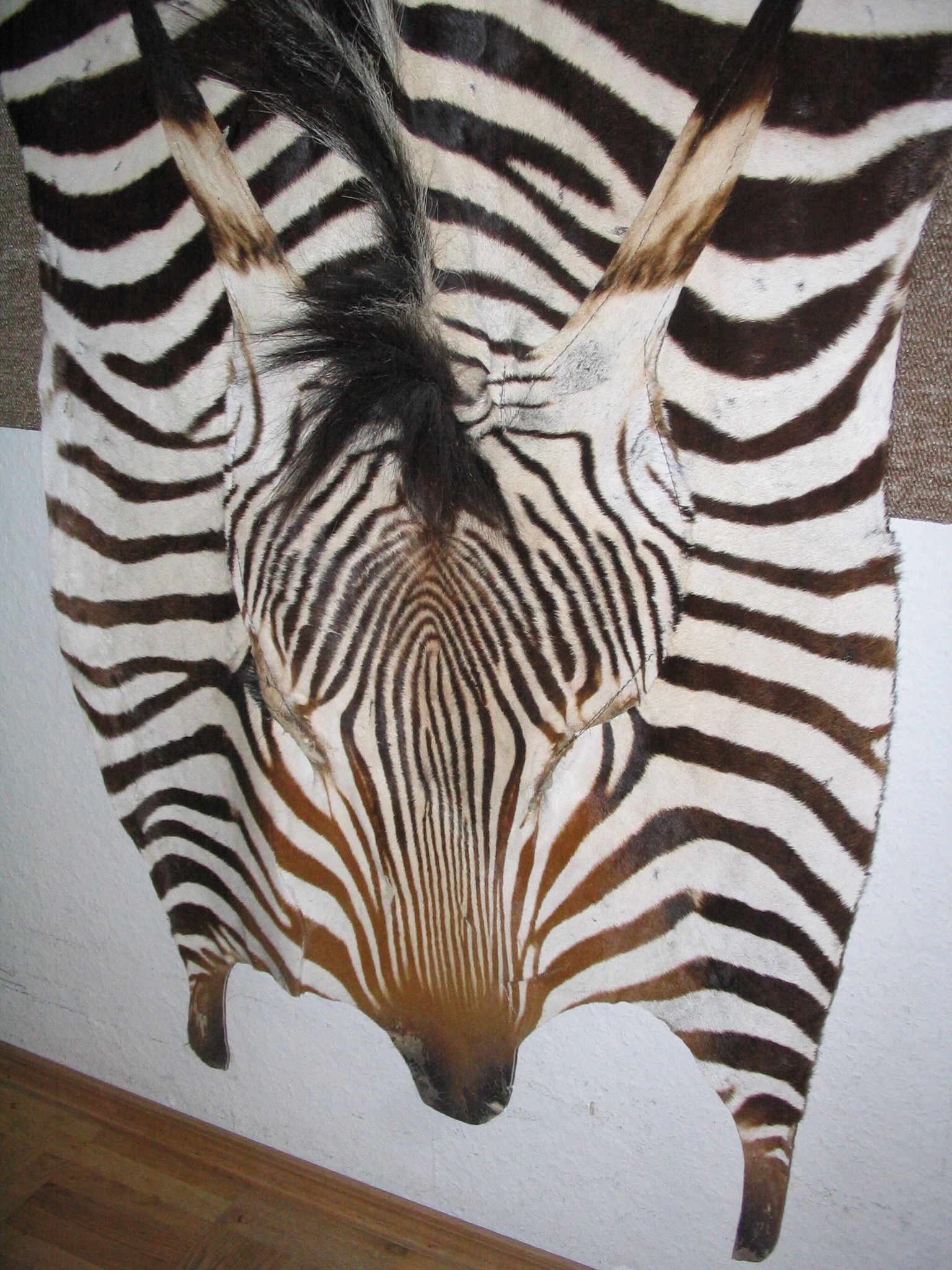 Zebrafell bei einem Frankfurter Rauchwarenhändler